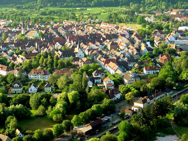 Luftbild von Kenzingen aufgenommen bei einer Ballonfahrt